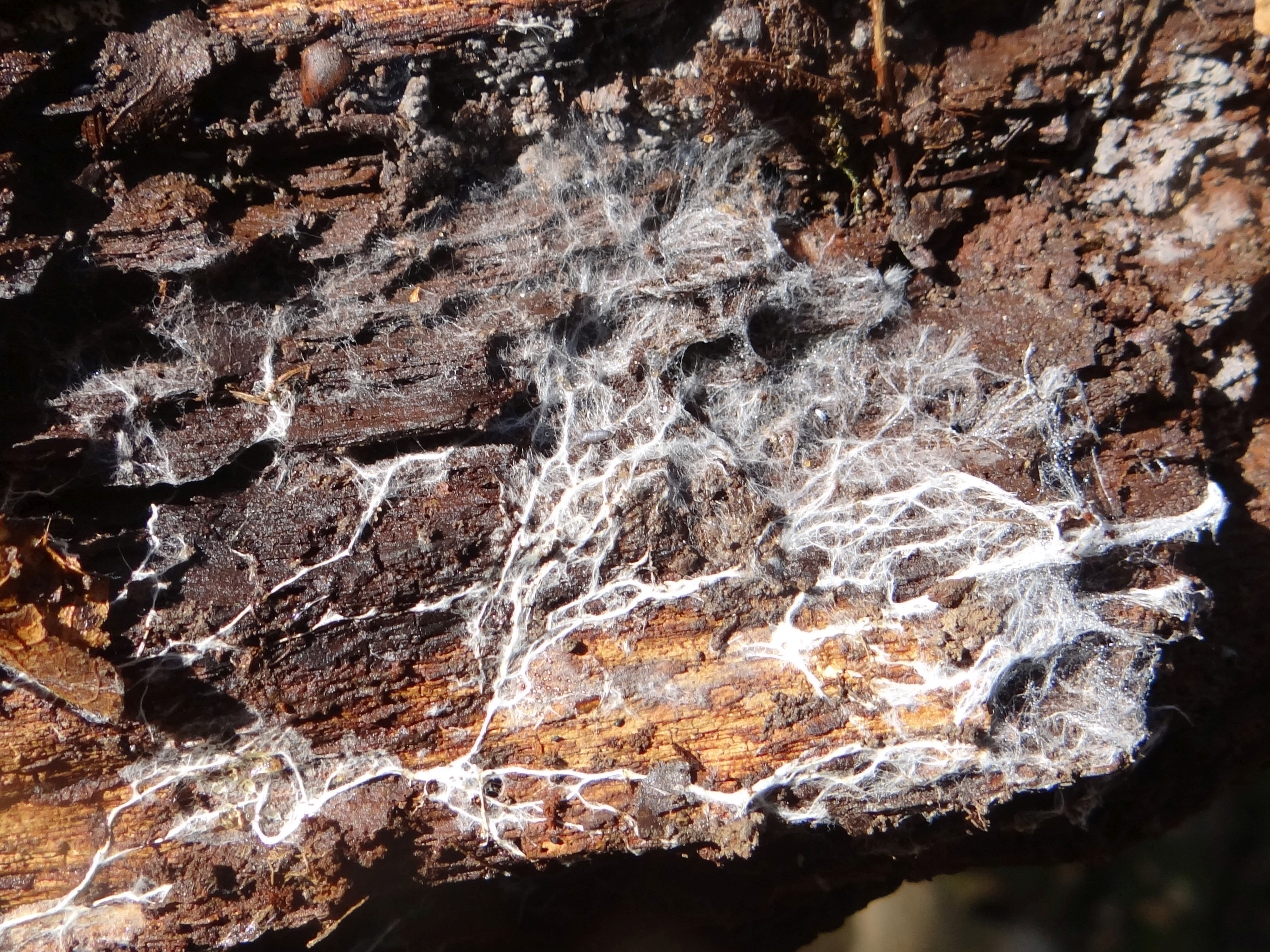 Mycelium